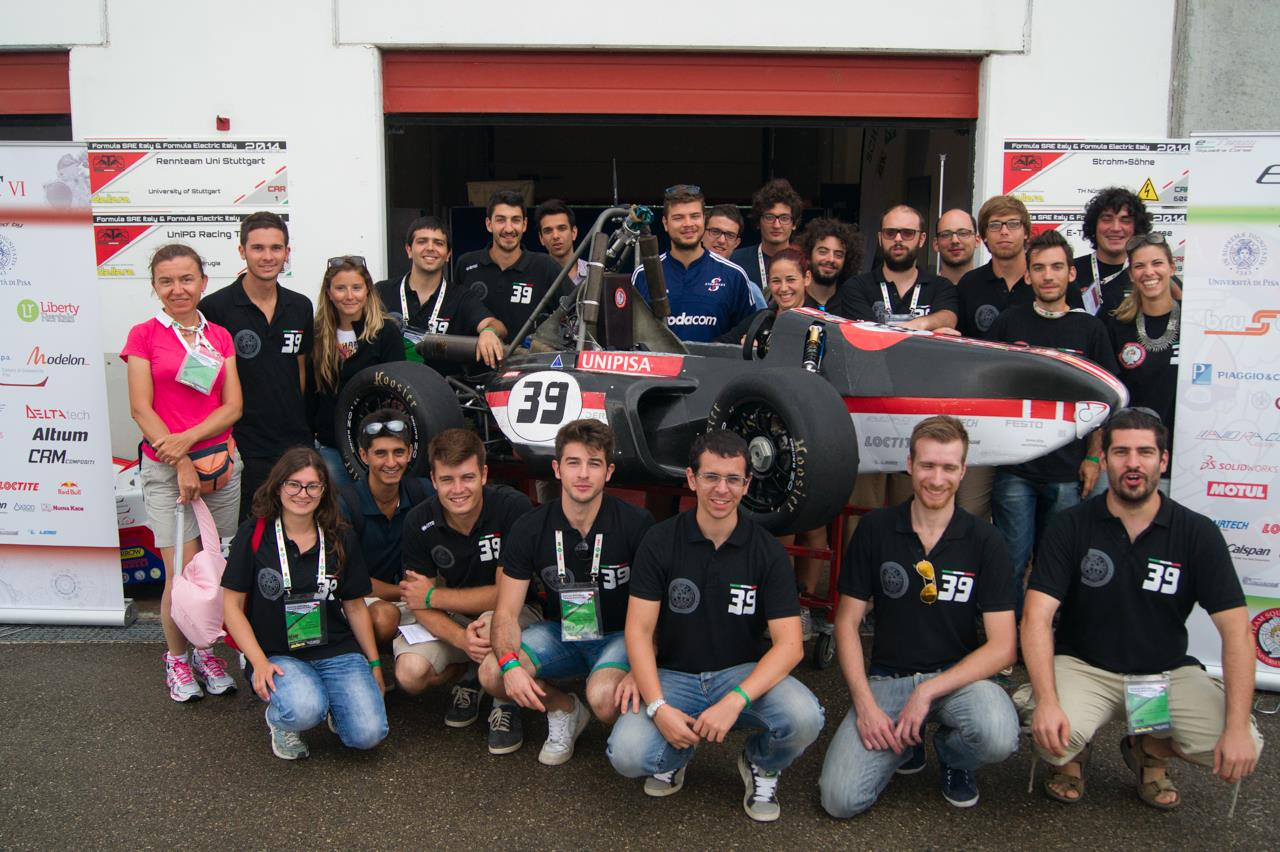 ETeam in postazione a Varano 2014